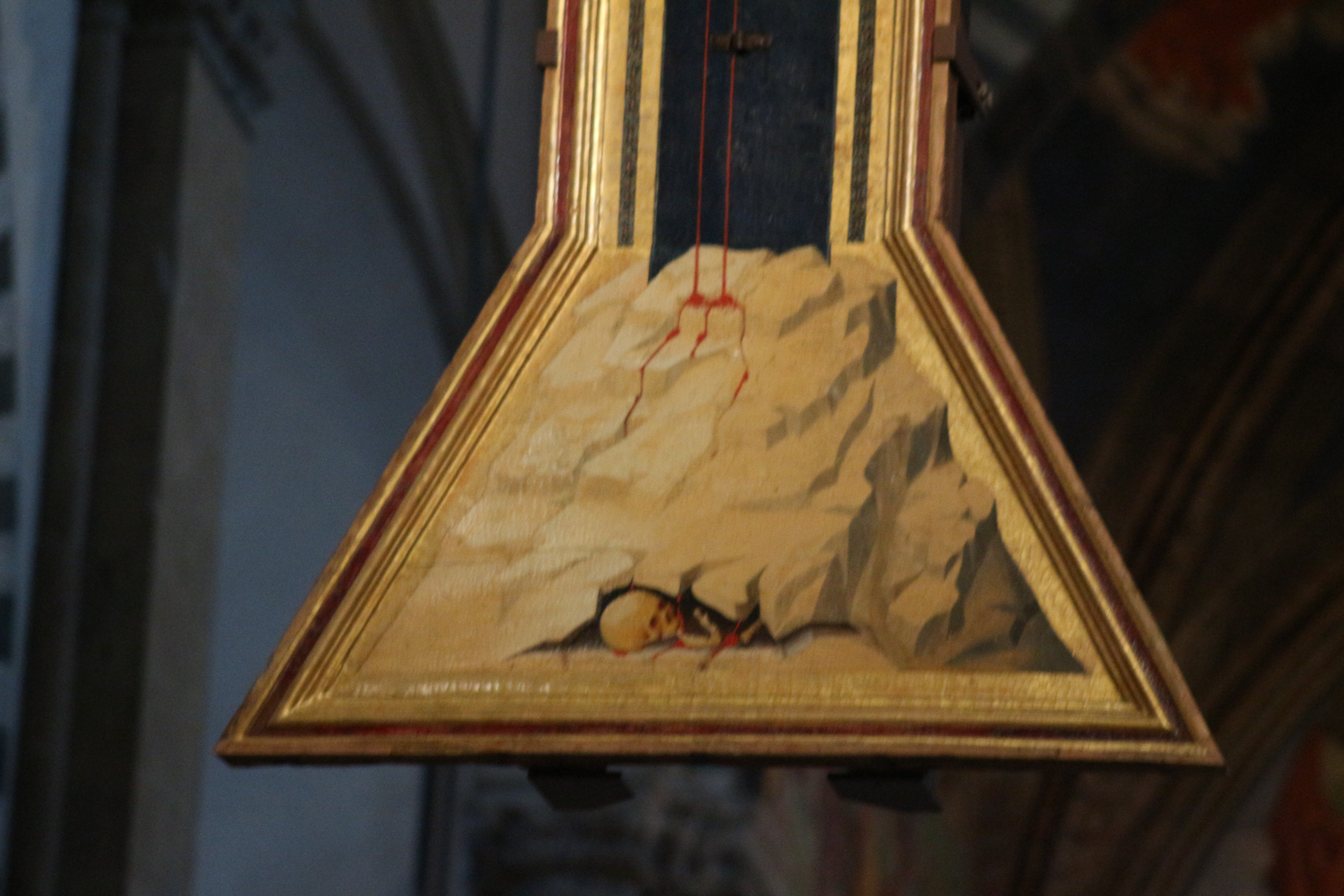 Dettaglio del Crocifisso di Giotto nella Basilica di Santa Maria Novella.